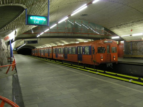 Romsås T-banestasjon. Tog mot sentrum på vestgående perrong. Foto: Jon Rogne 30. aug 2005 kl.21:44 (UTC)